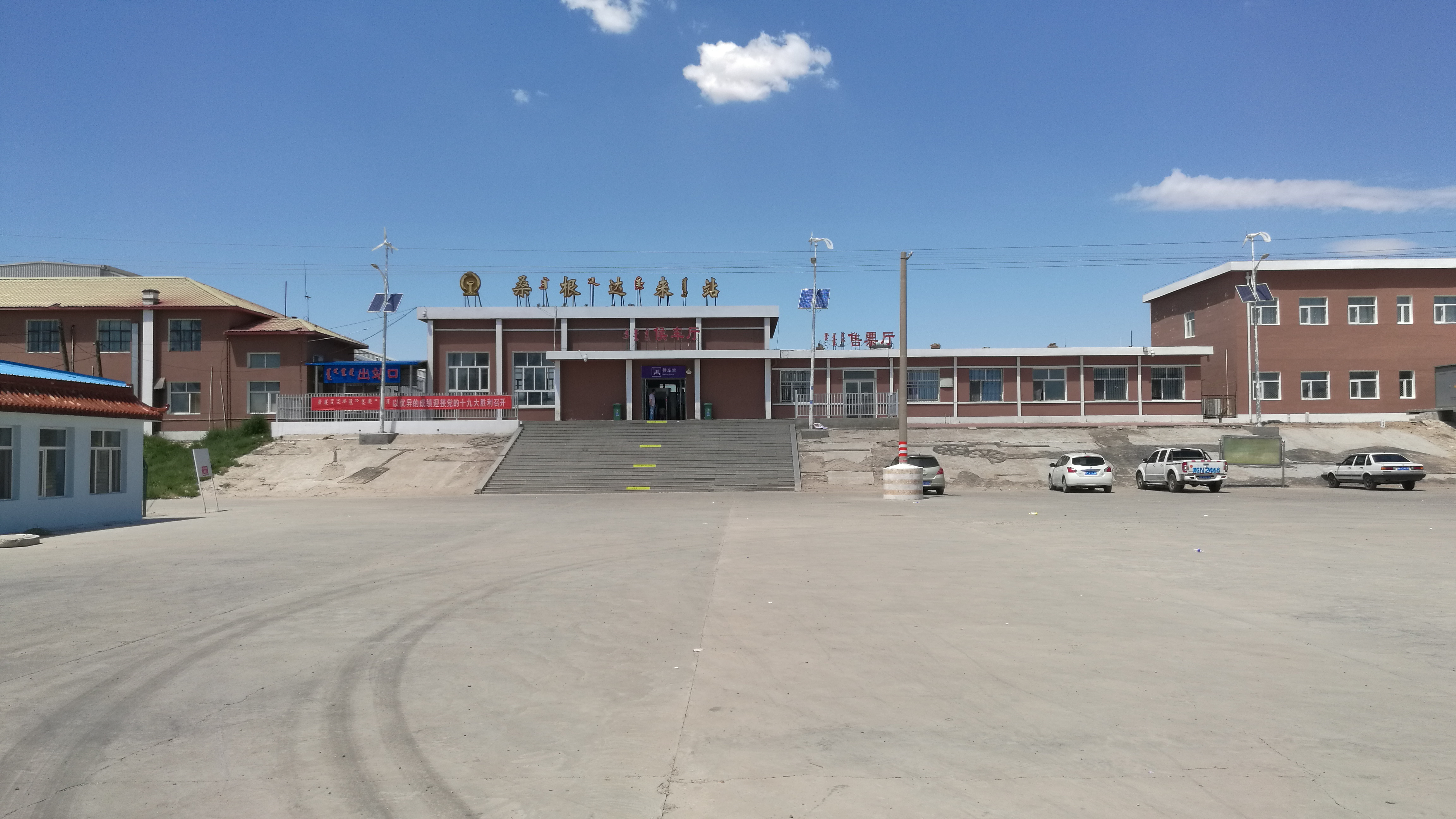 集通铁路桑根达来站站房外立面